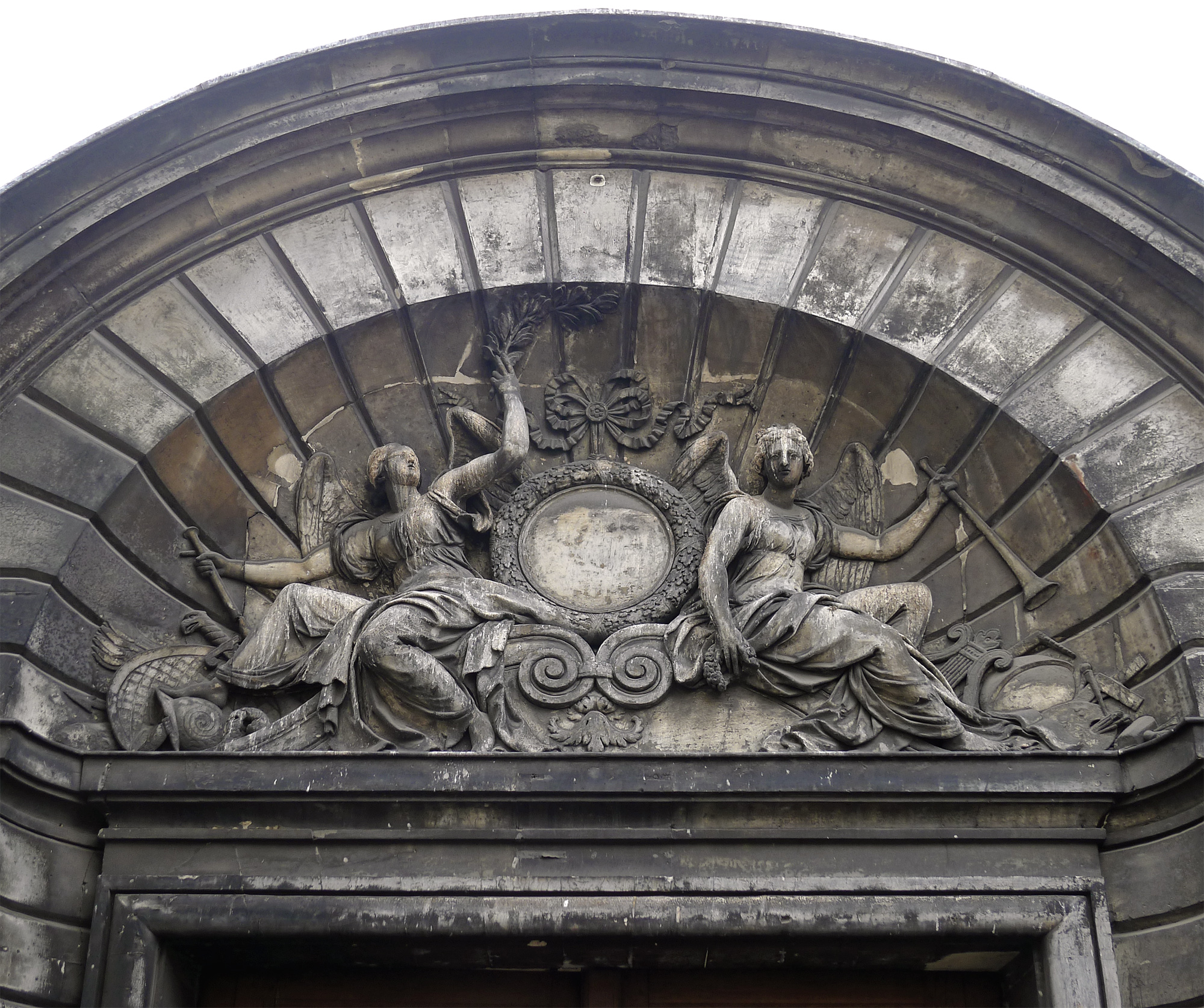 Rue Vielle du Temple (n°47 : hôtel Amelot de Bisseuil, fronton) - Paris IV .